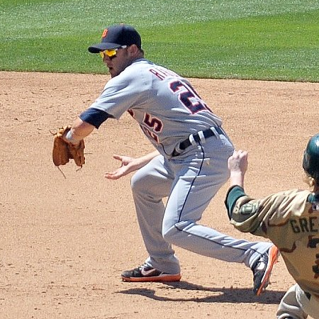 Ryan Raburn